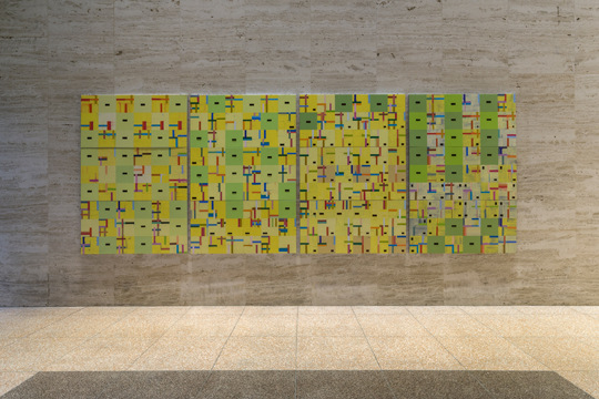 Palais de Mari (Feldman), Traduction picturale, Hall de la Place Ville-Marie, Montréal, Québec. Ensemble de huit tableaux (2016) qui consiste en une transposition, mesure par mesure, de la pièce pour piano Palais de Mari (1986) du compositeur Morton Feldman. Ainsi, chaque emplacement des formes géométriques et des couleurs correspond à un système de notation graphique singulier qui transcrit les signes de la partition musicale originale.